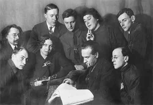 Члены Ленинградского отдела Всероссийского союза поэтов. В первом ряду: А.П.Крайский, М.М.Шкапская, И.И.Садофьев, Г.Б.Шмерельсон. Во втором ряду: А.В.Туфанов, Ин.А.Оксёнов, Вс.А.Рождественский, Е.Г.Полонская, К.К.Вагинов. Ленинград. 1925. ИМЛИ